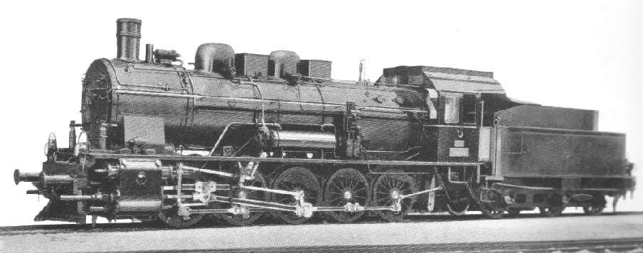 A NOHAB cég gőzmozdonya, 1927